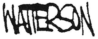 Signatur Bill Wattersons zu einem Calvin-und-Hobbes-Comicstrip.